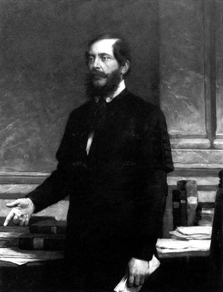 Lajos Kossuth (1802 -1891)